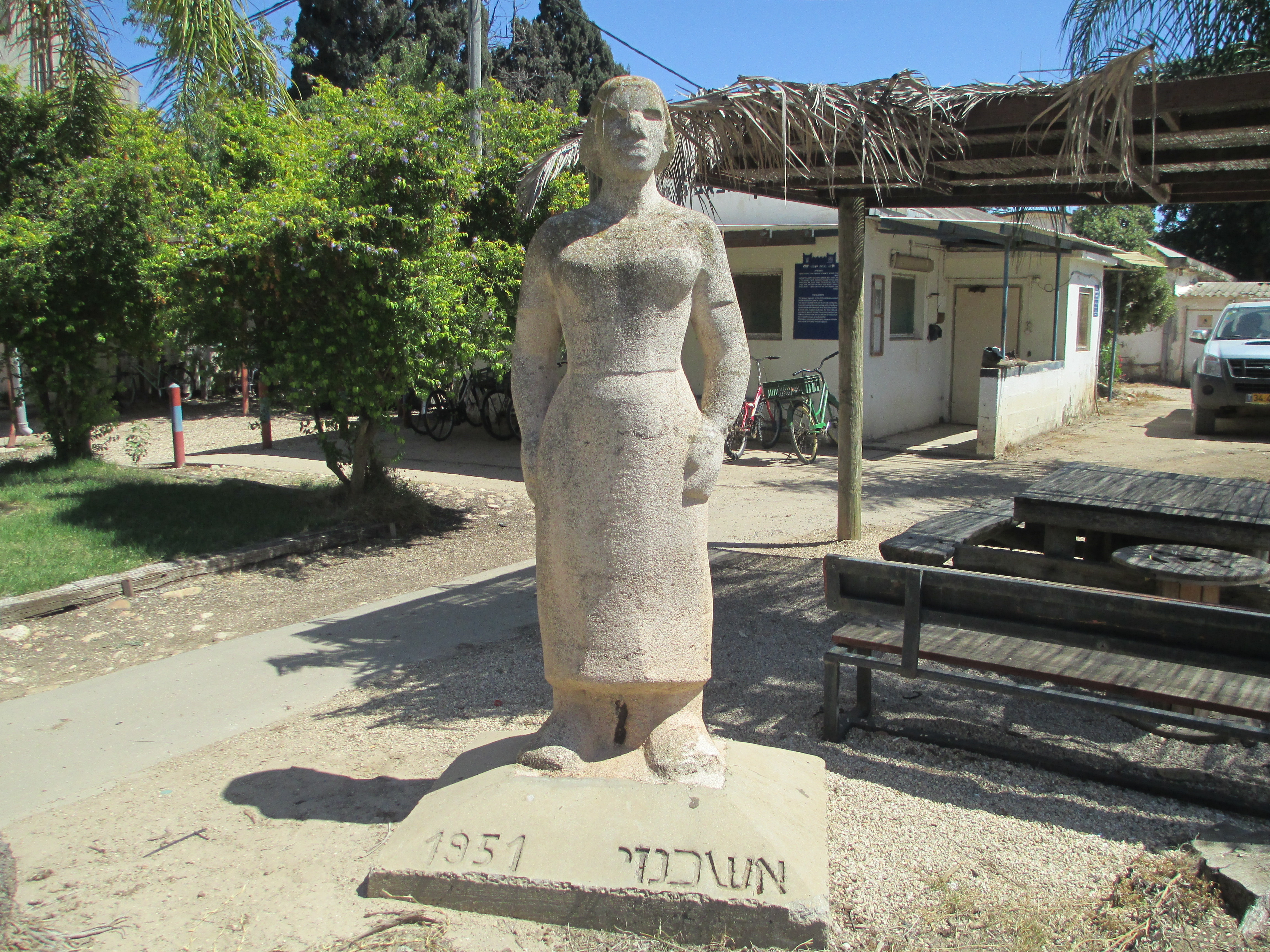 פסל של אהרון אשכנזי בכפר מסריק